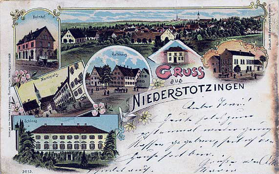 Stadt Niederstotzingen / Germany, Postcard circa 1900